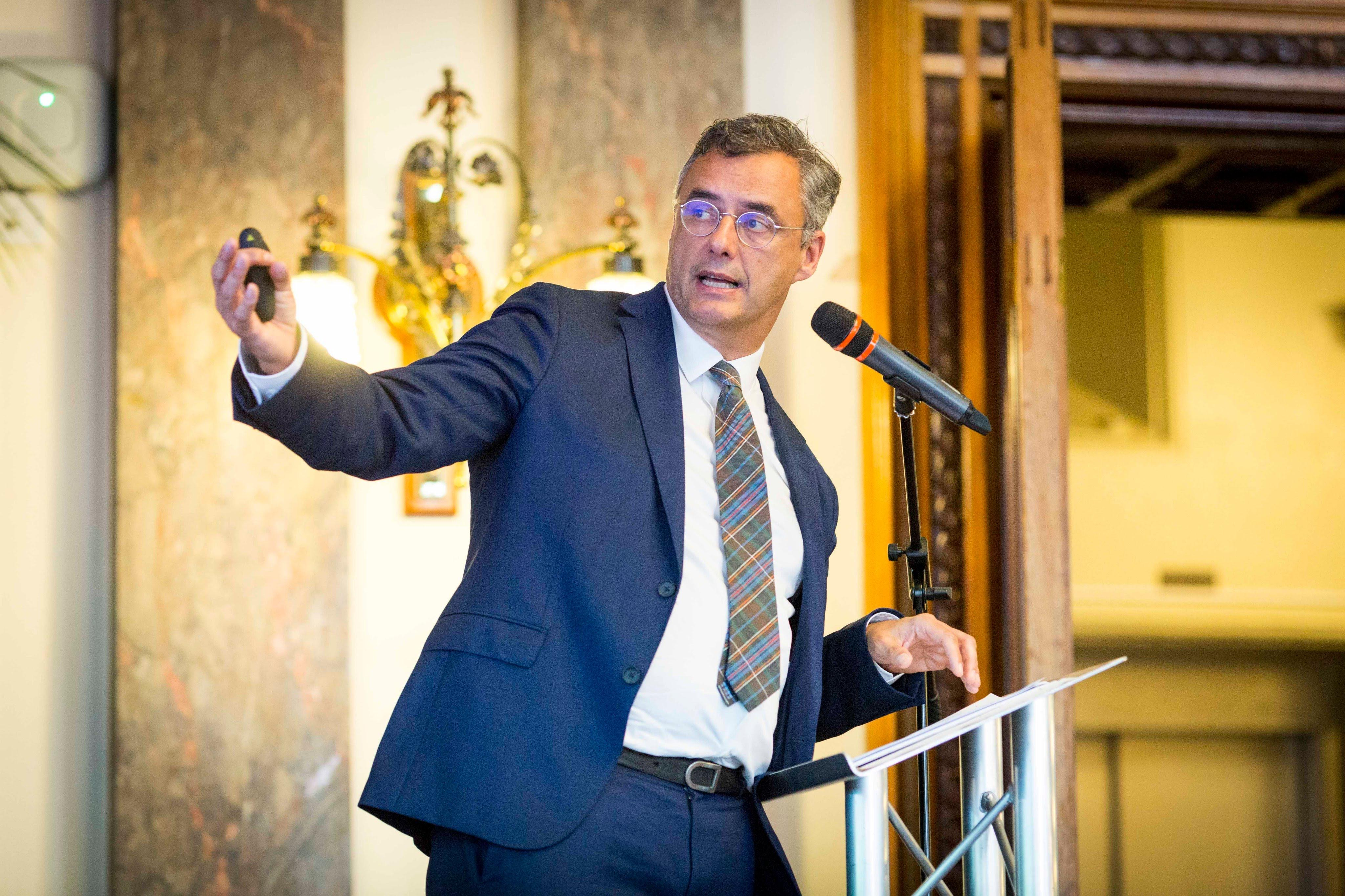 Joachim Coens lezing over Brexit.